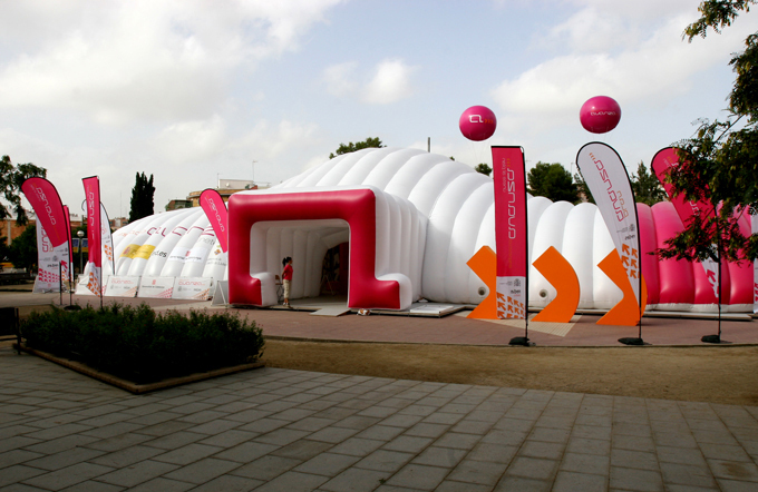 Carpa Hinchable de 650m2